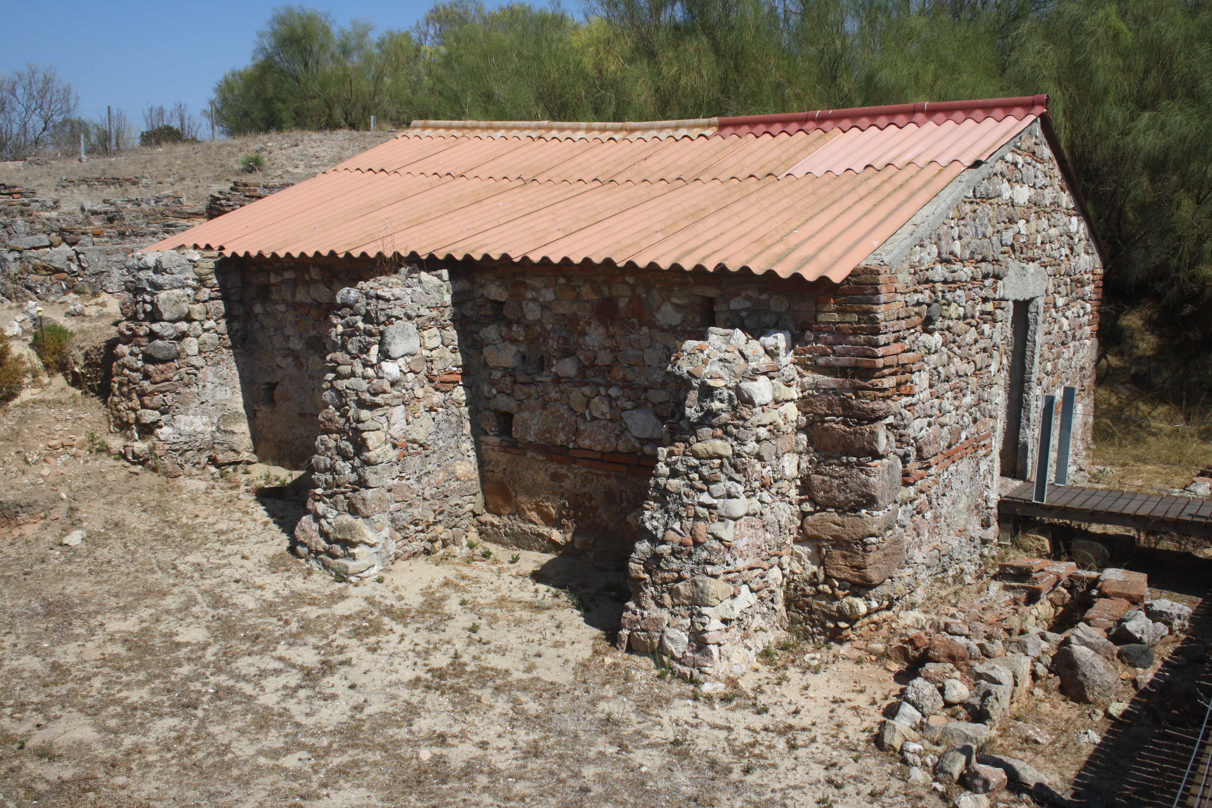 Mausoleum bij viszouterij